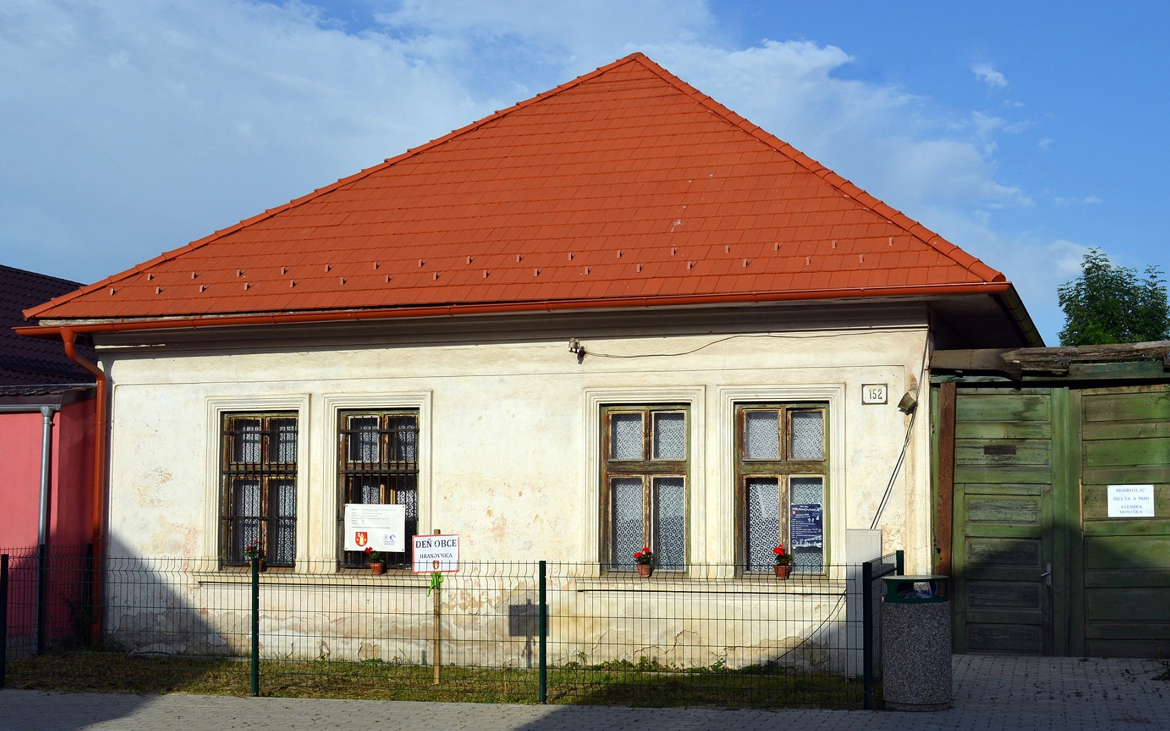 Elemír Montško - Dielňa